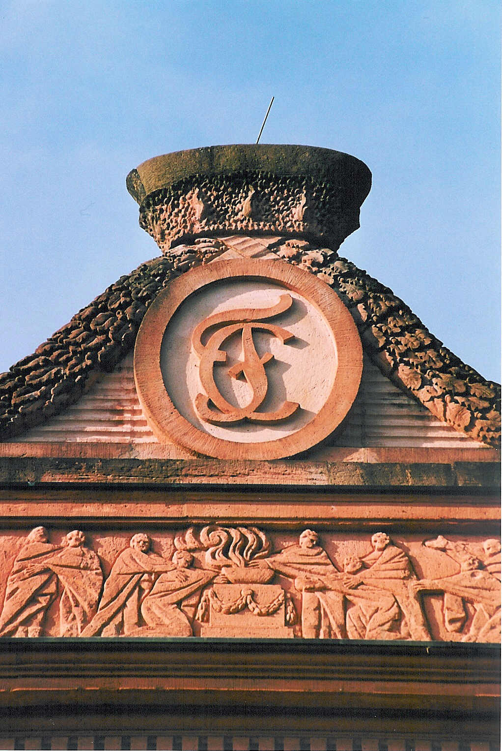 Herrscher-Monogramm von Friedrich Carl von Erthal, Erzbischof und Kurfürst von Mainz, angebracht am Giebel des Schösschens Schönbusch im Park Schönbusch bei Aschaffenburg Monogram of archbishop and prince elector Friedrich Carl von Erthal on Schönbusch Manor at Aschaffenburg / Germany